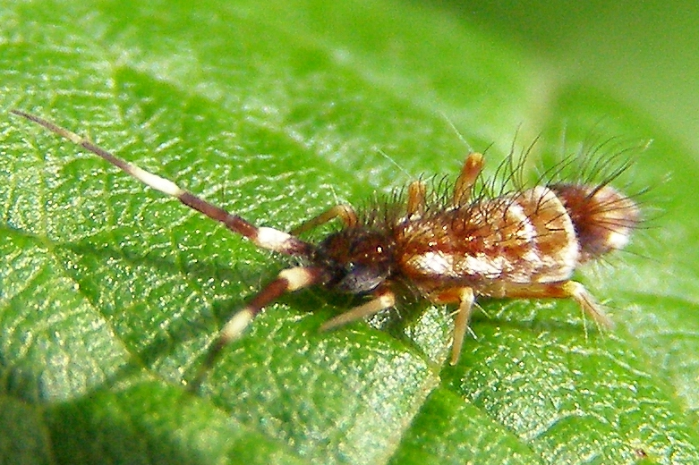 Springschwanz Collembola. Orchesella flavescens.